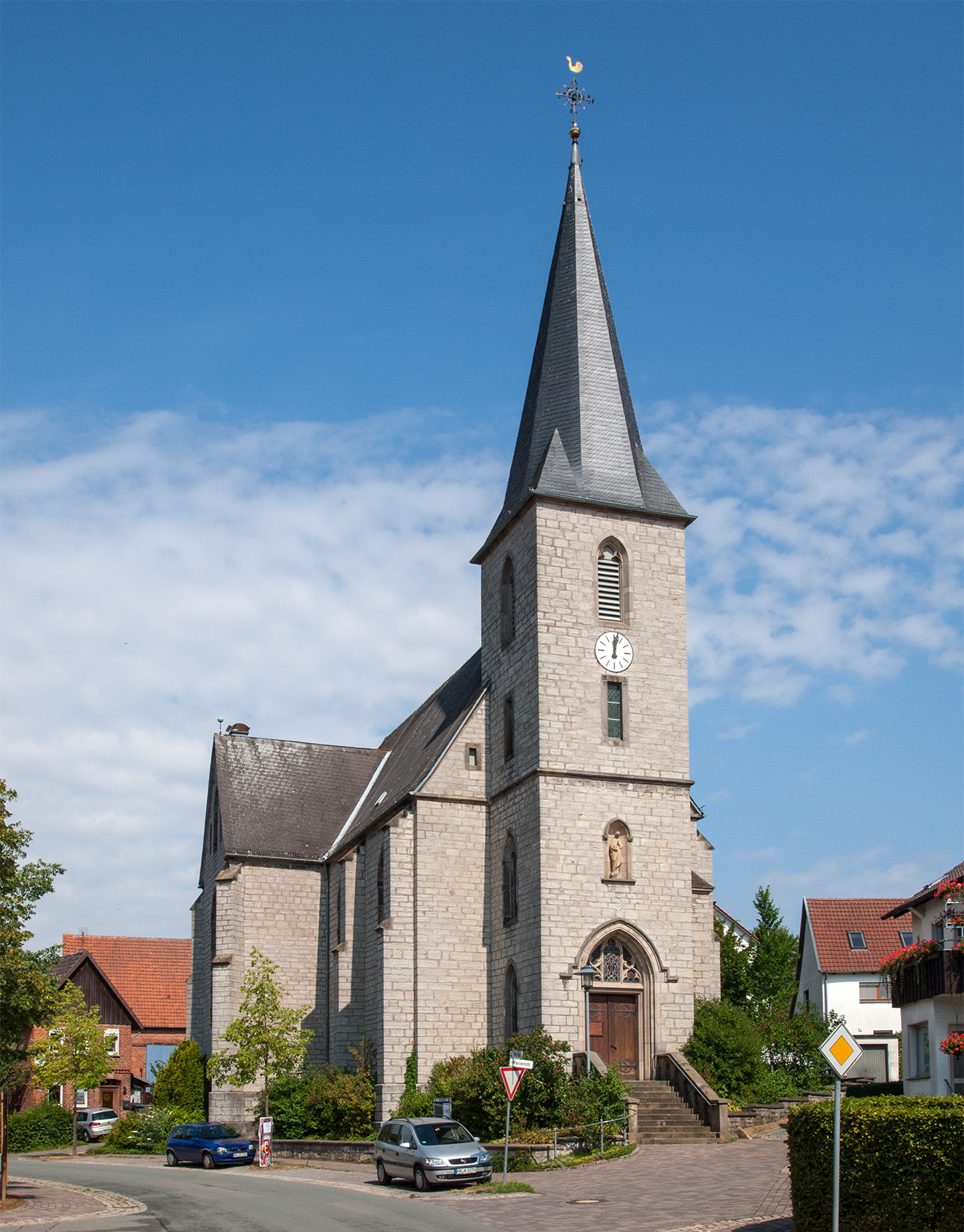 Kath. Pfarrkirche St. Marien in Ottenhausen (Steinheim) This is a photograph of an architectural monument.